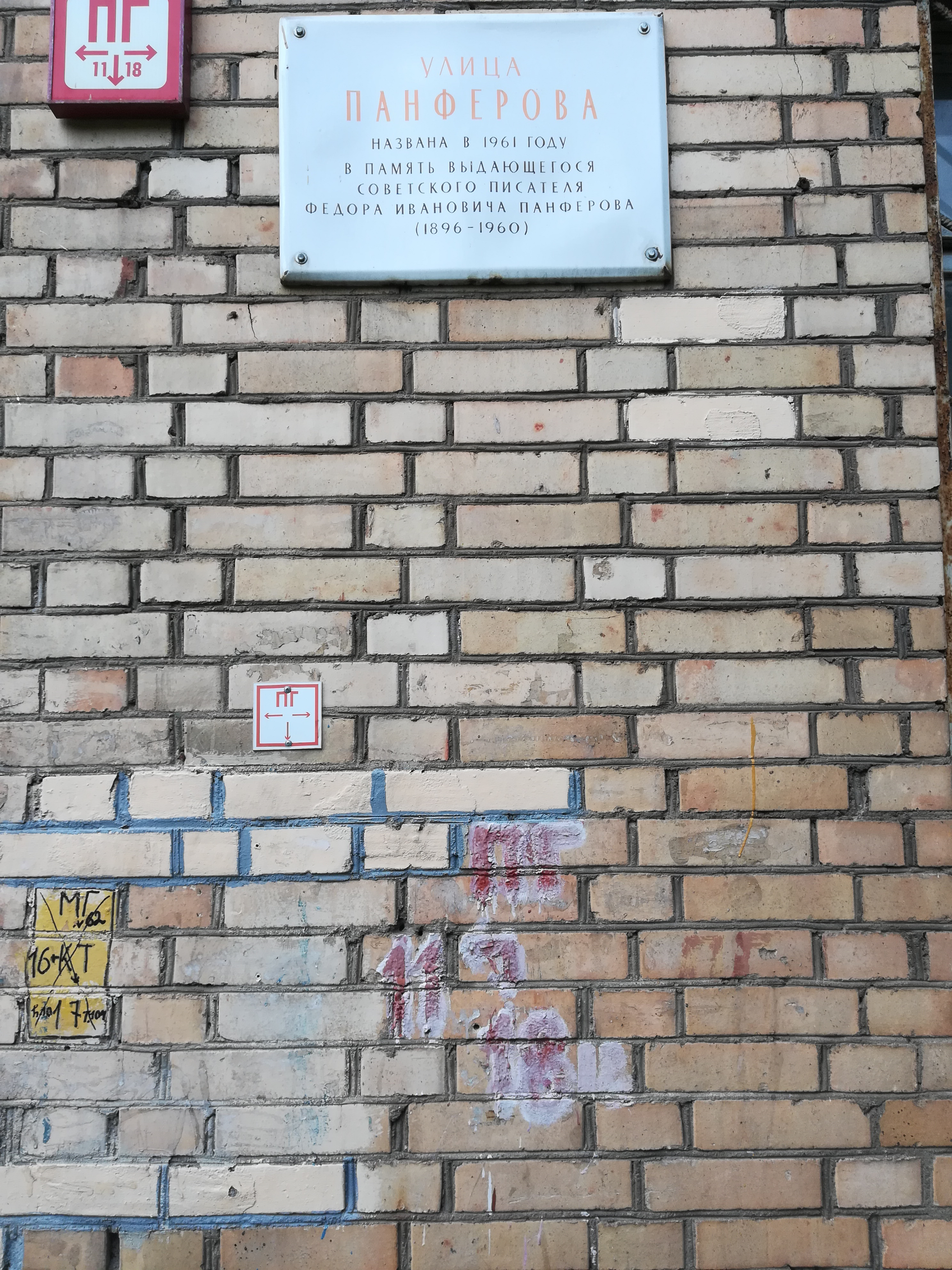 Улица Панферова